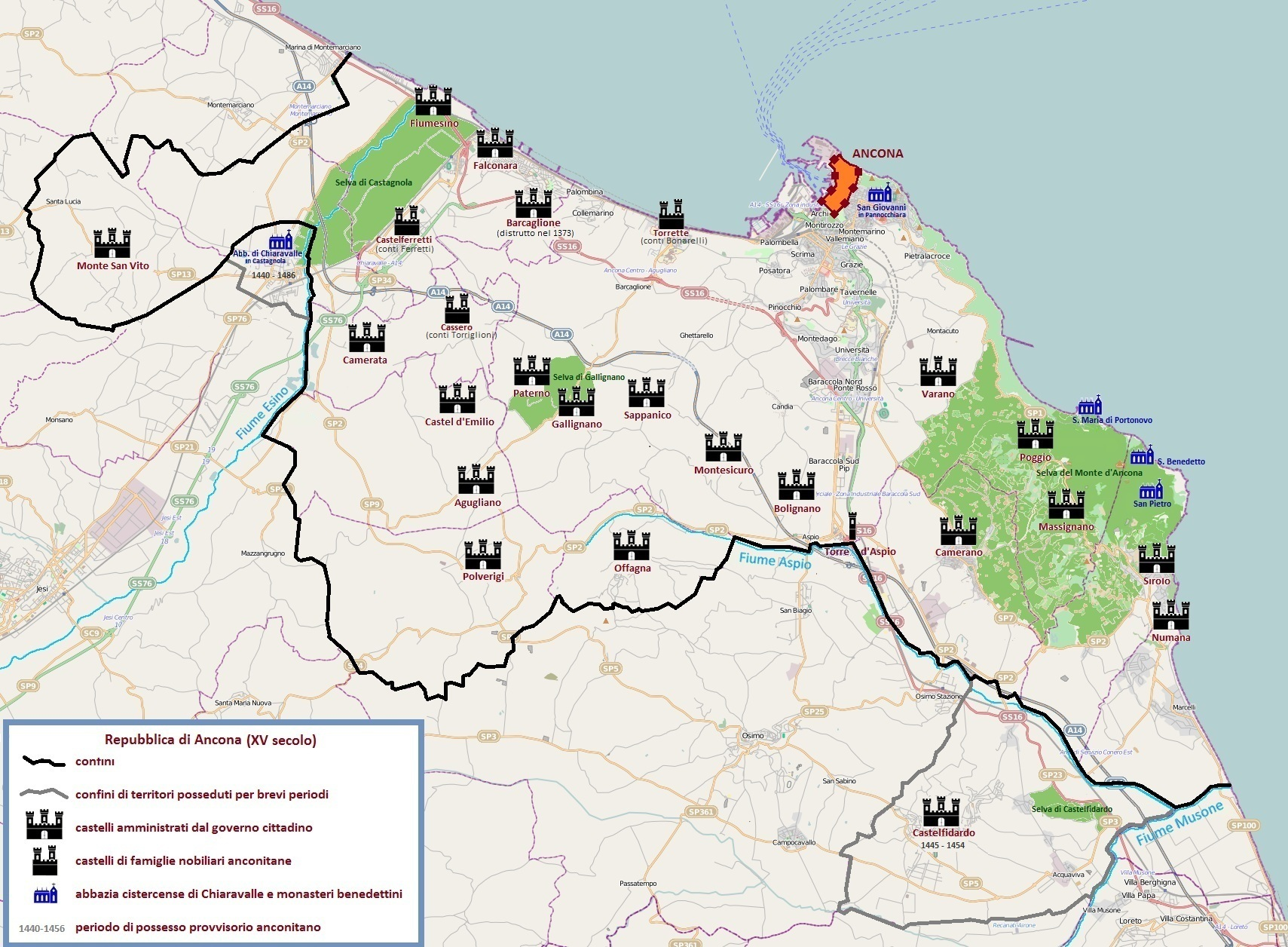 Carta geografica della Repubblica di Ancona nel XV secolo, con confini, castelli, possessi temporanei, abbazie, monasteri, selve.